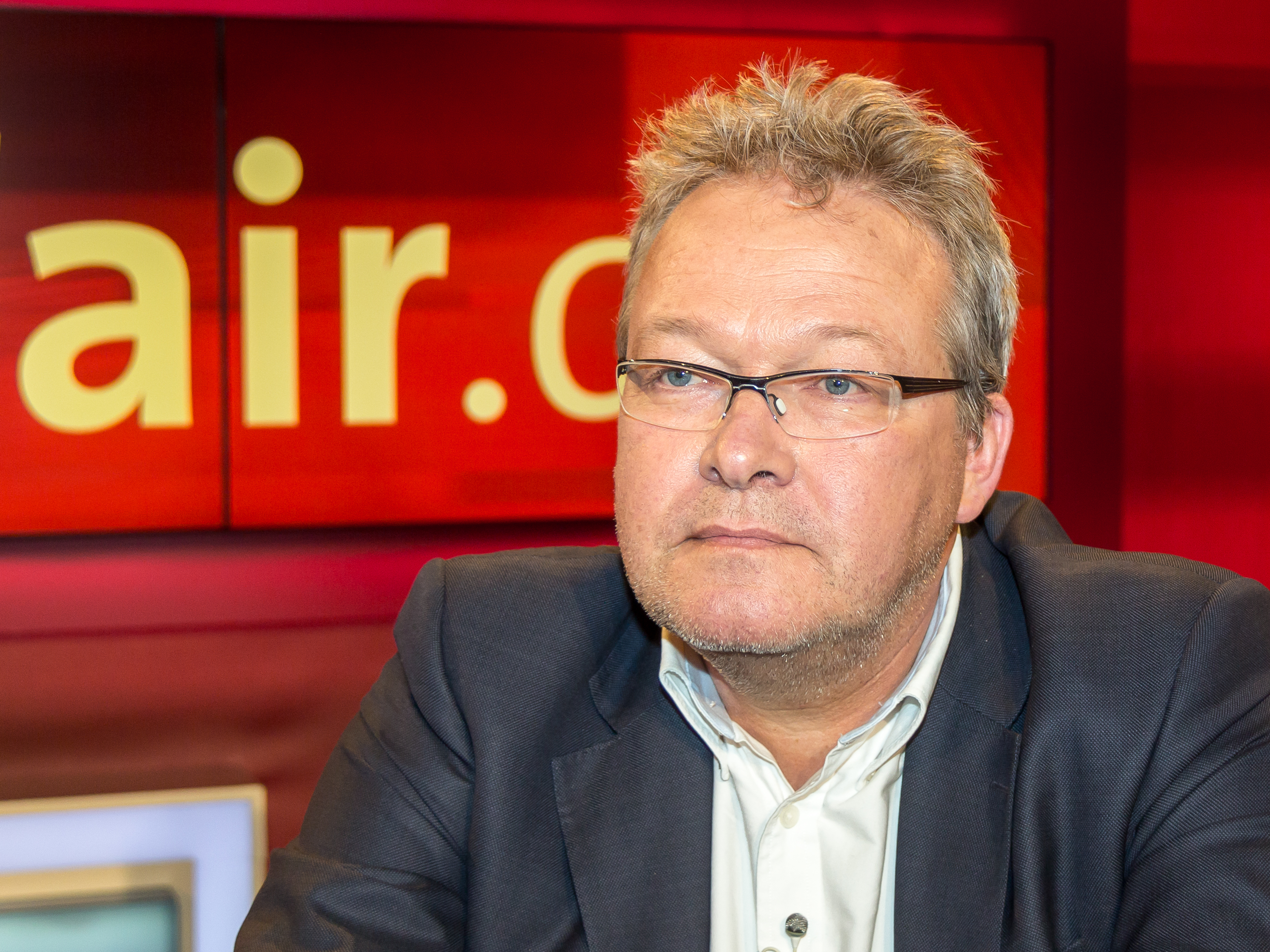 Hart aber Fair, Sendung vom 21. März 2016 zum Thema: „Zocker belohnen, Sparer bestrafen – Zinspolitik gegen die Bürger?“ Foto: Rainer Voss, ehemaliger Investmentbanker